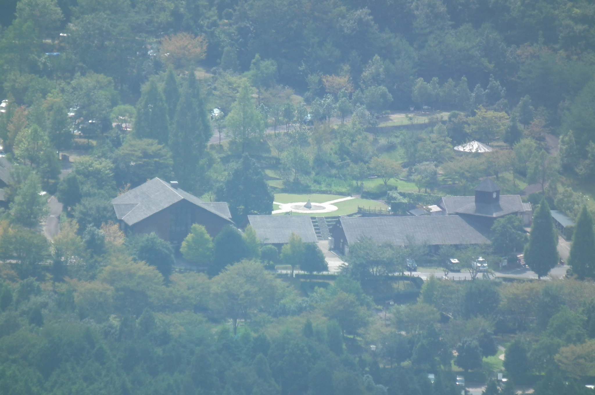 客家語/Hak-kâ-ngî: Higashi harima nidokei no oka koen 東はりま日時計の丘公園 白山より俯瞰